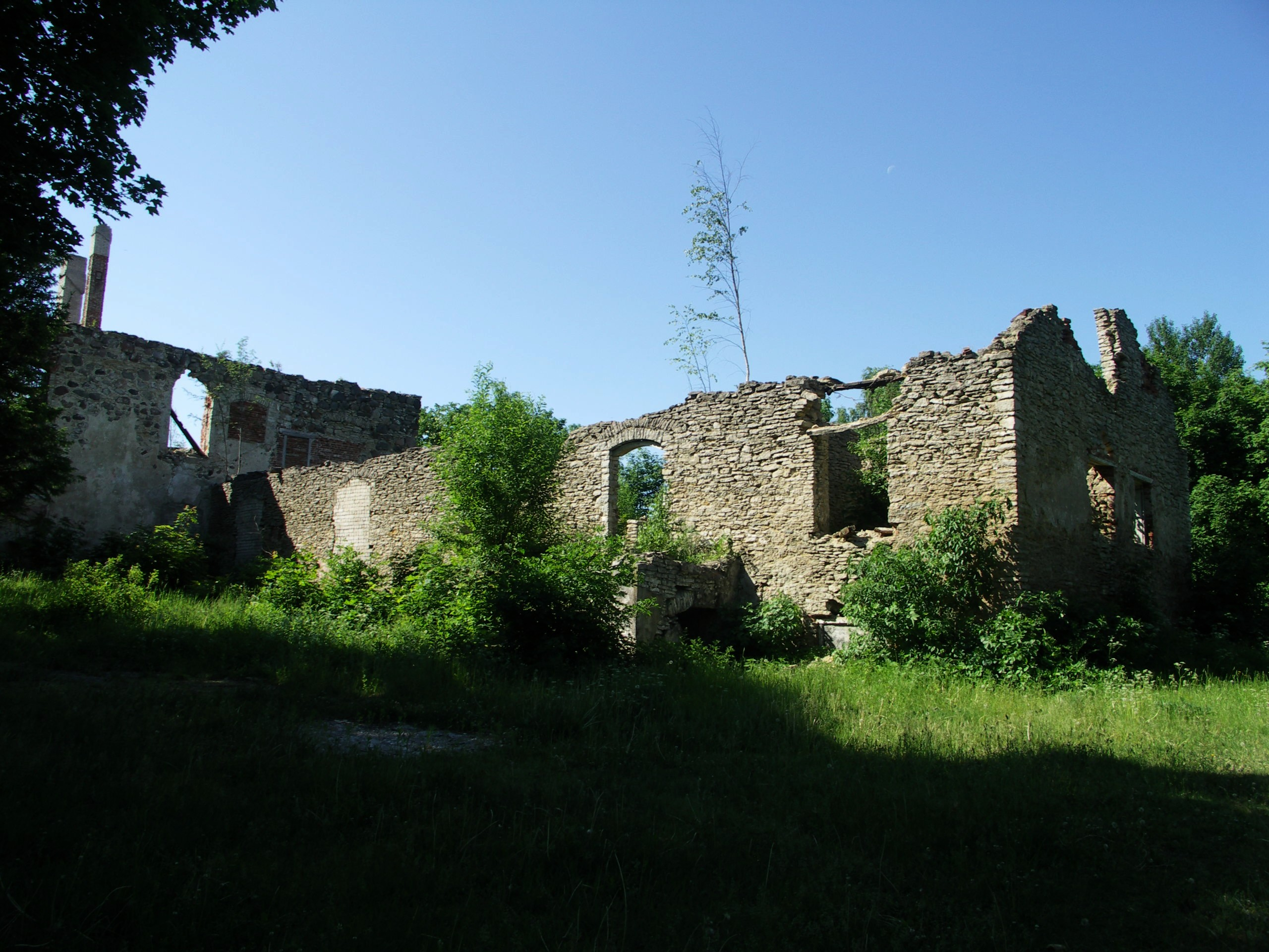 Kiltsi mõisa varemed Lääne maakonnas Ridala vallas